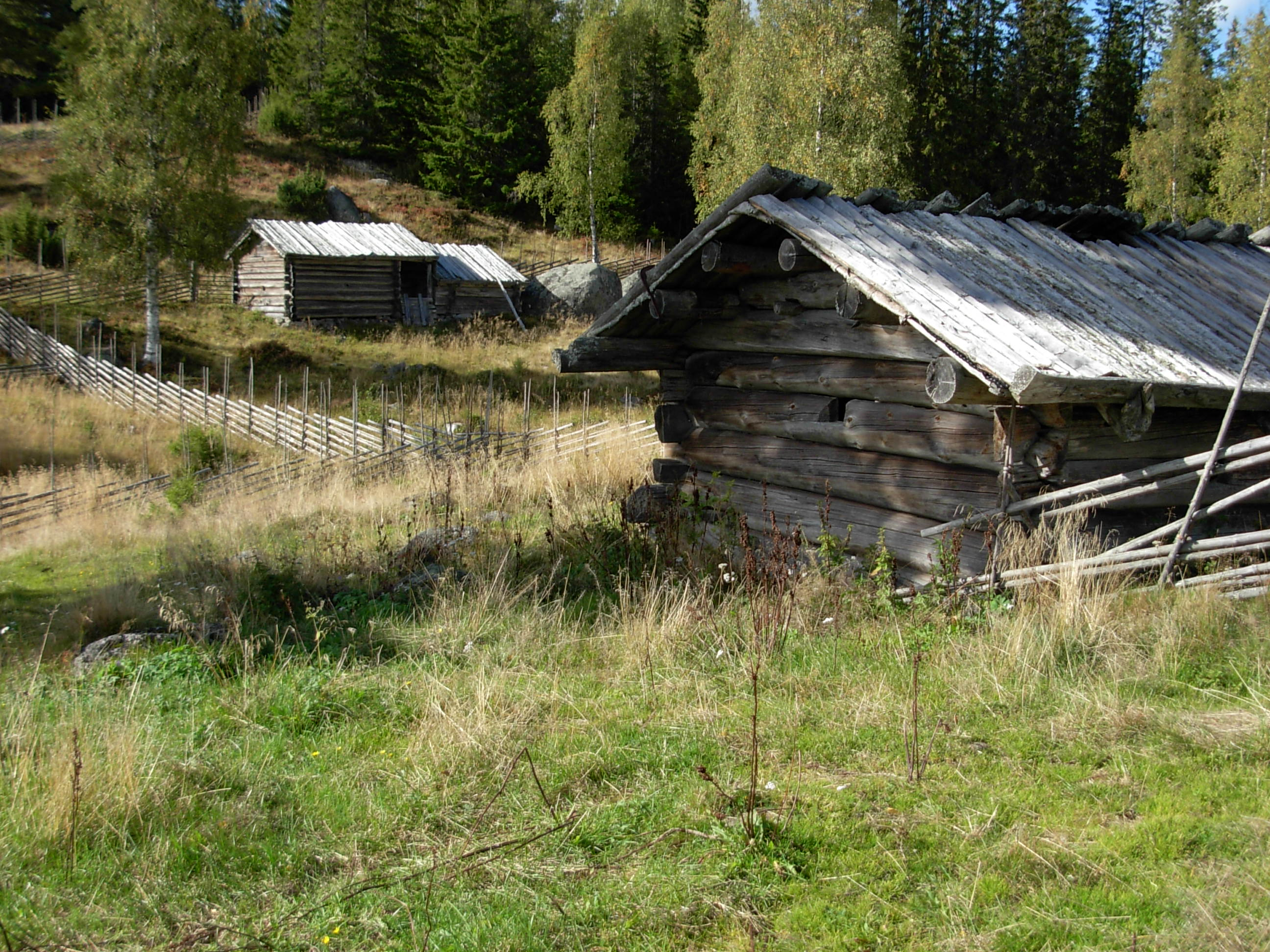 Bild från Ärteråsens fäbodar.